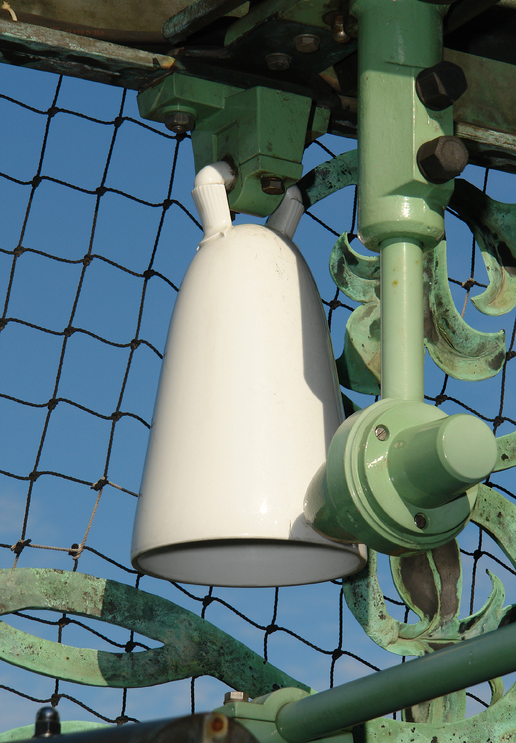 Böttcherstraße Bremen, Haus des Glockenspiels: Meißner-Porzellanglocken (drittes Glockenspiel), Reihe 4 rechts